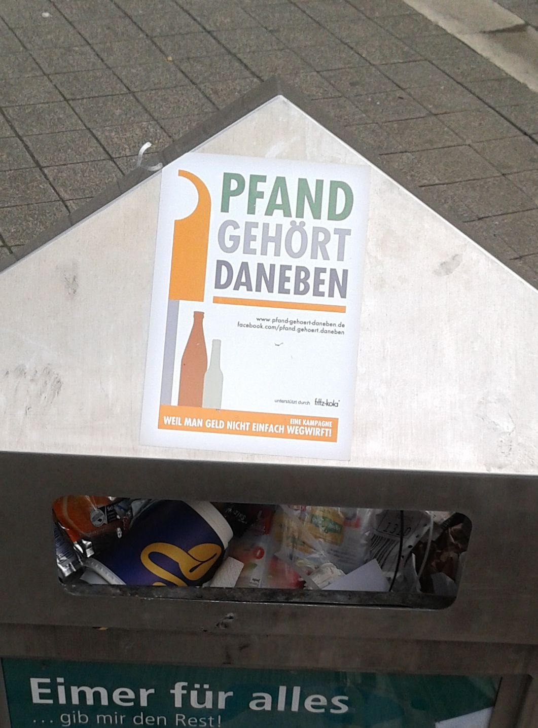 Mülleimer in Bielefeld mit Werbeaufkleber für die Aktion "Pfand gehört daneben". Aufkleber zeigt Unterstützer fritz-kola.